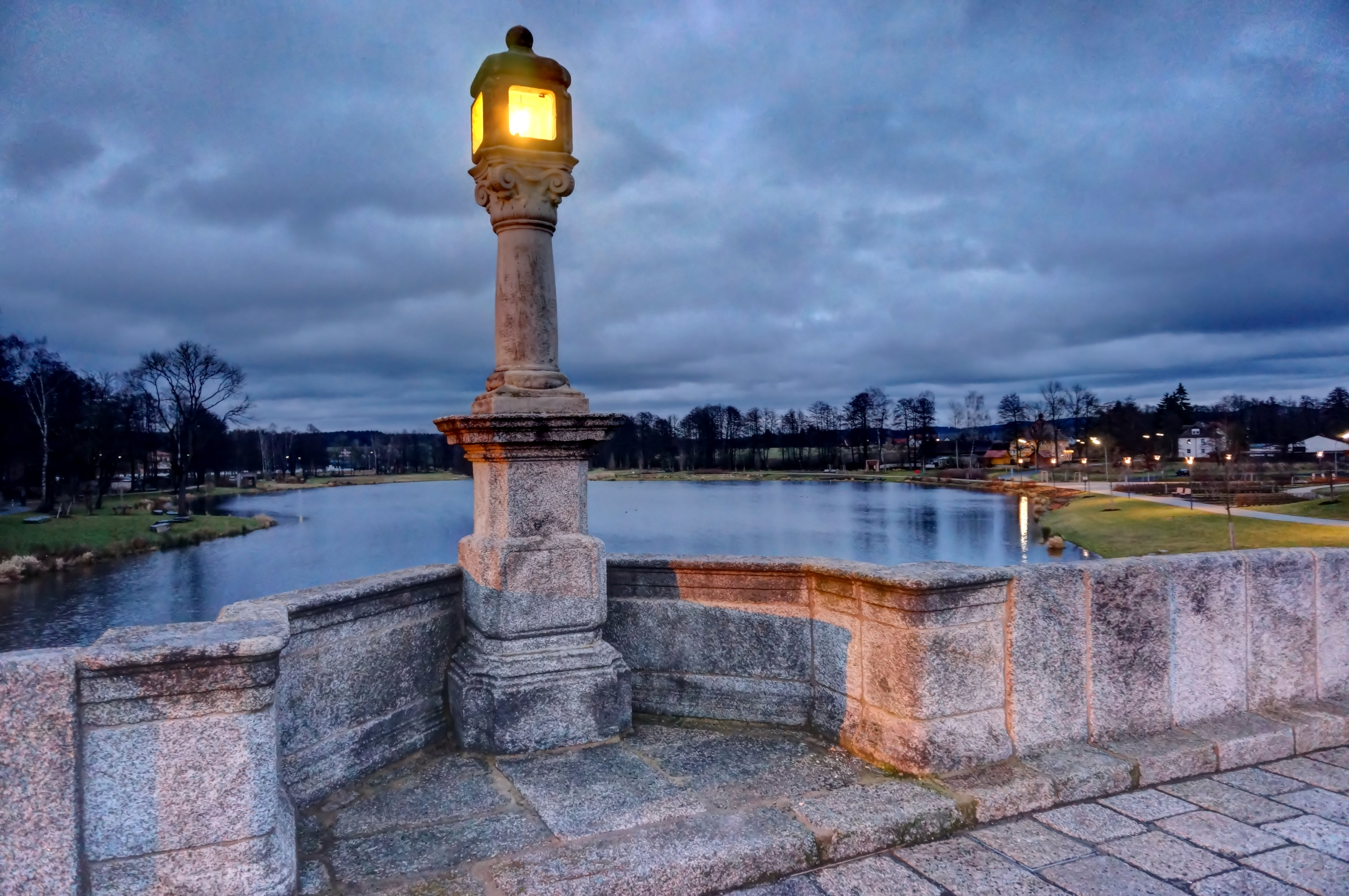 DEutschland, BAyern, Oberbayern, Landkreis Tirschenreut, Tirschenreuth, Fischhofbrücke